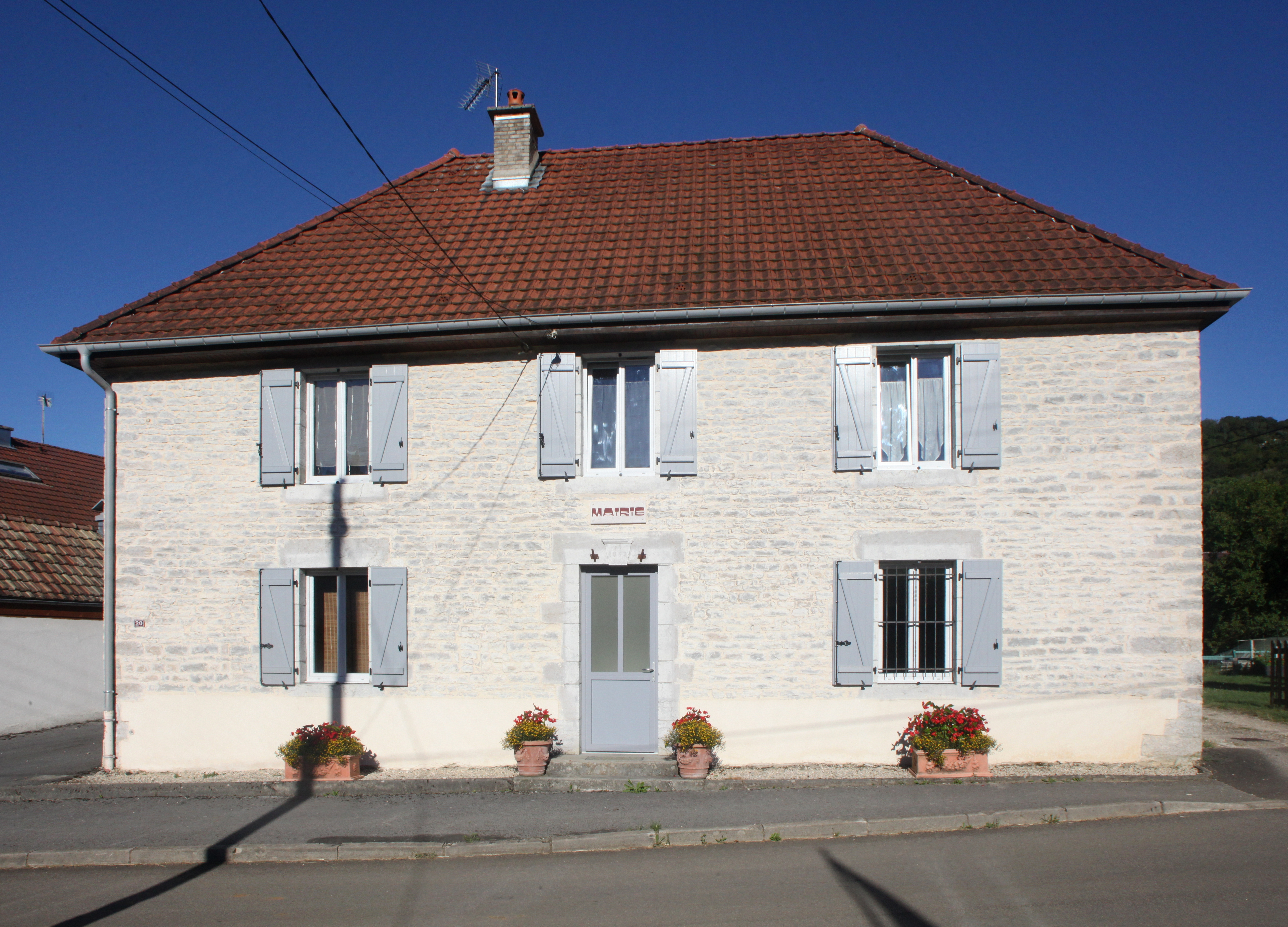 Mairie de Chaux-les-Passavant (Doubs).